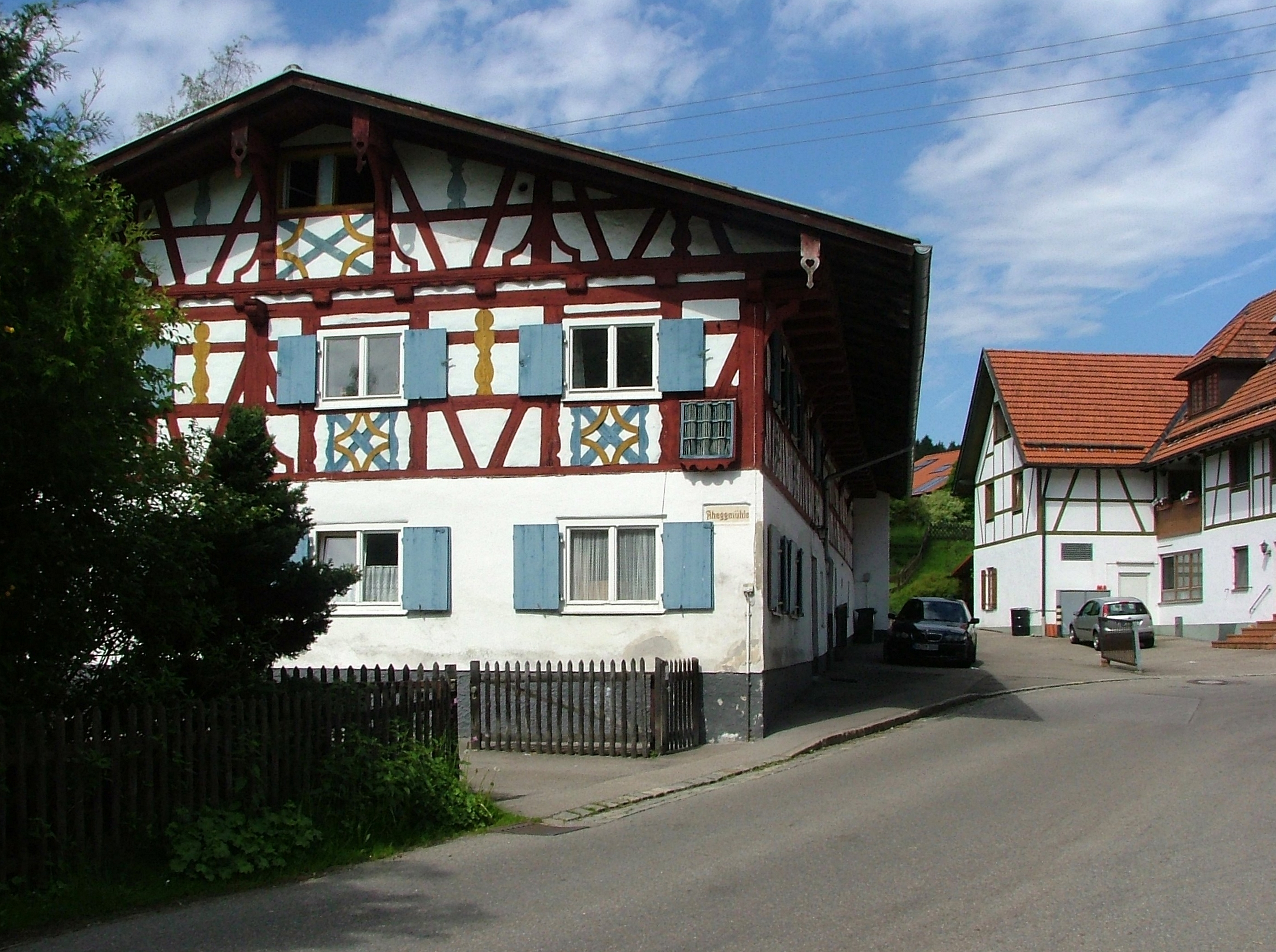 Ahegg